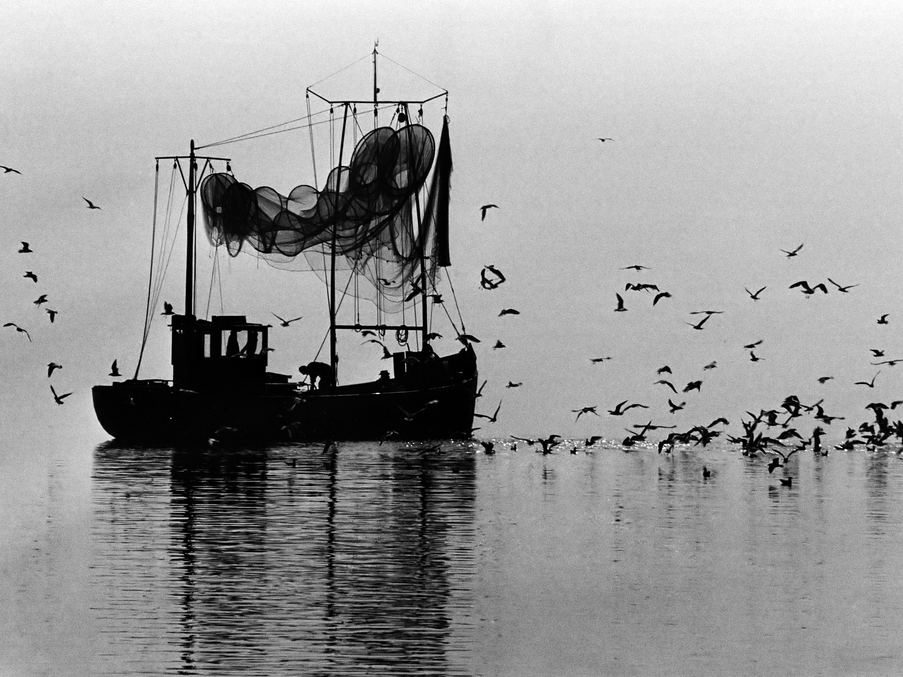 Visserij op het IJsselmeer 11 september 1979